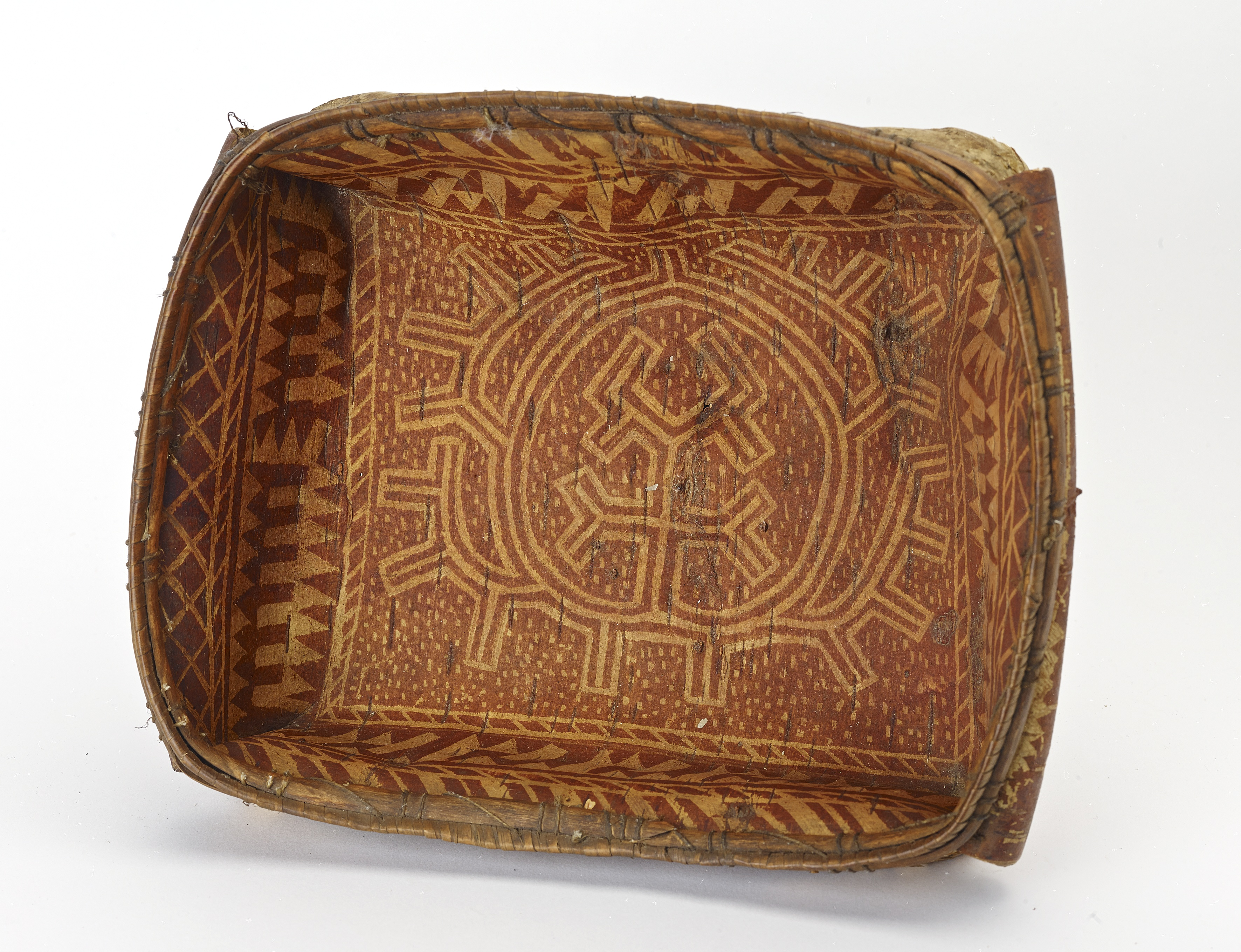 Hantien tuohiastia 1800-luvulta. Astian koristeluna on kehystetty käpy.